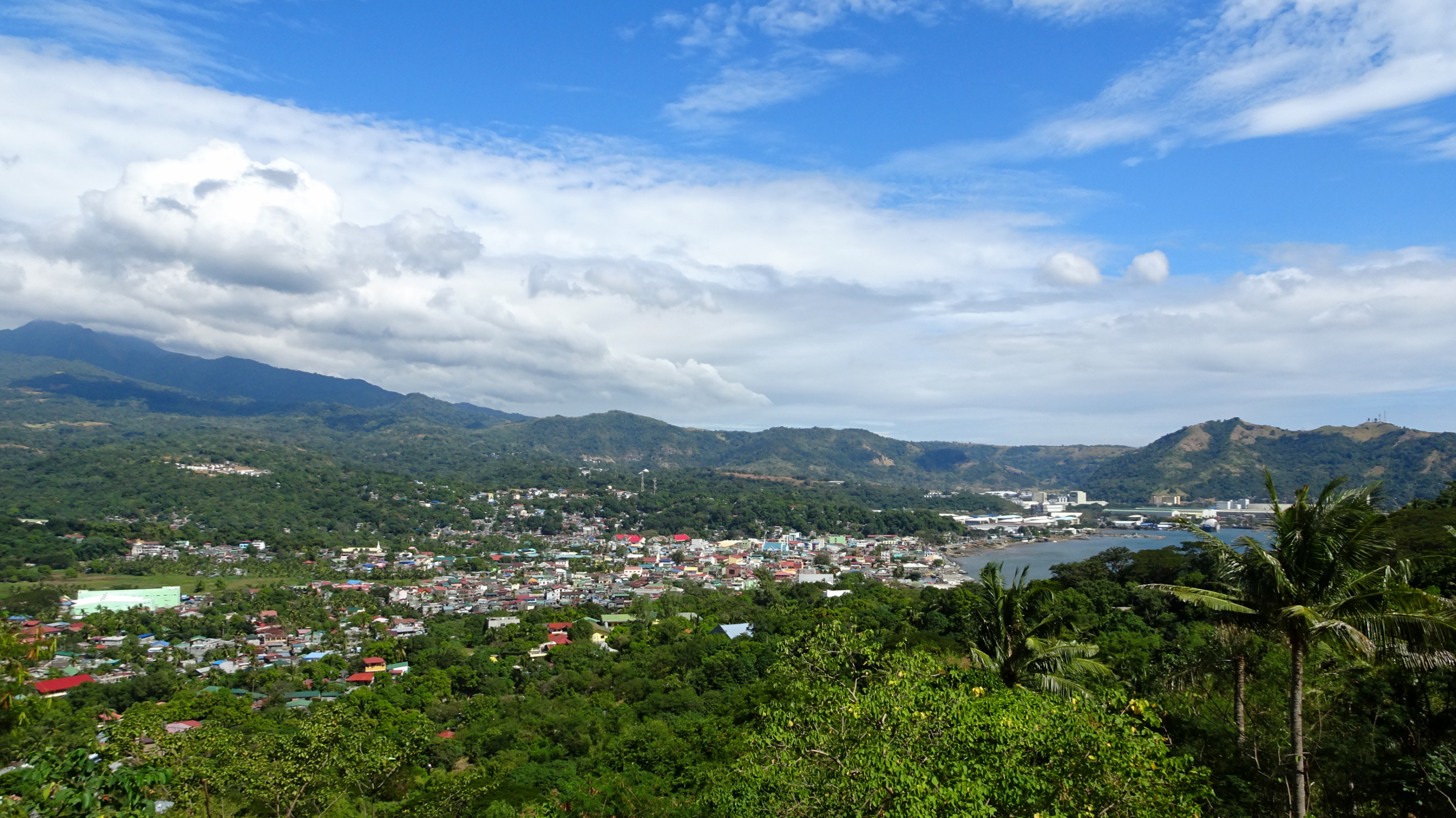 Mariveles, Bataan, Philippines